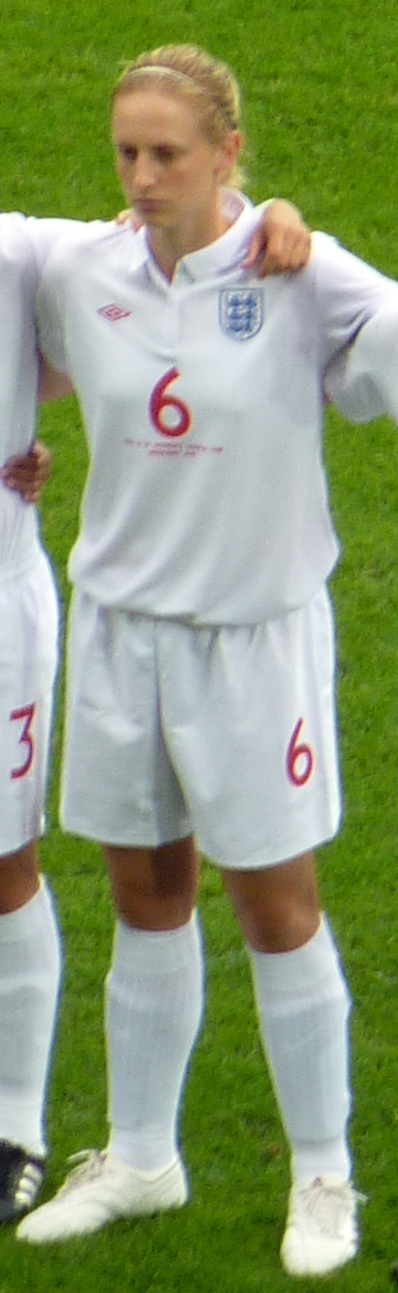 FIFA U-20-Fußball-Weltmeisterschaft der Frauen 2010, Englische Nationalmannschaft, Spiel 13 in Augsburg